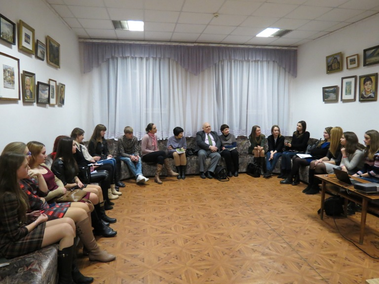 Засідання клубу "Роса" з майстрами Слова